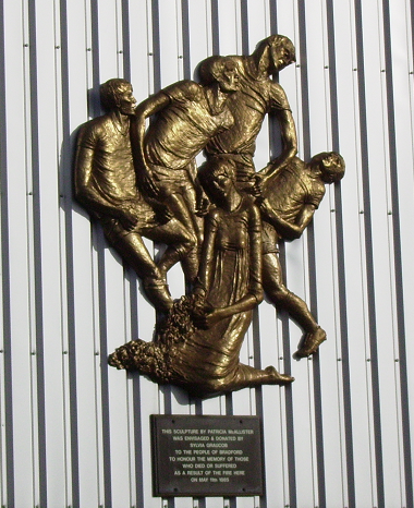 Fire memorial at Valley Parade stadium, Bradford